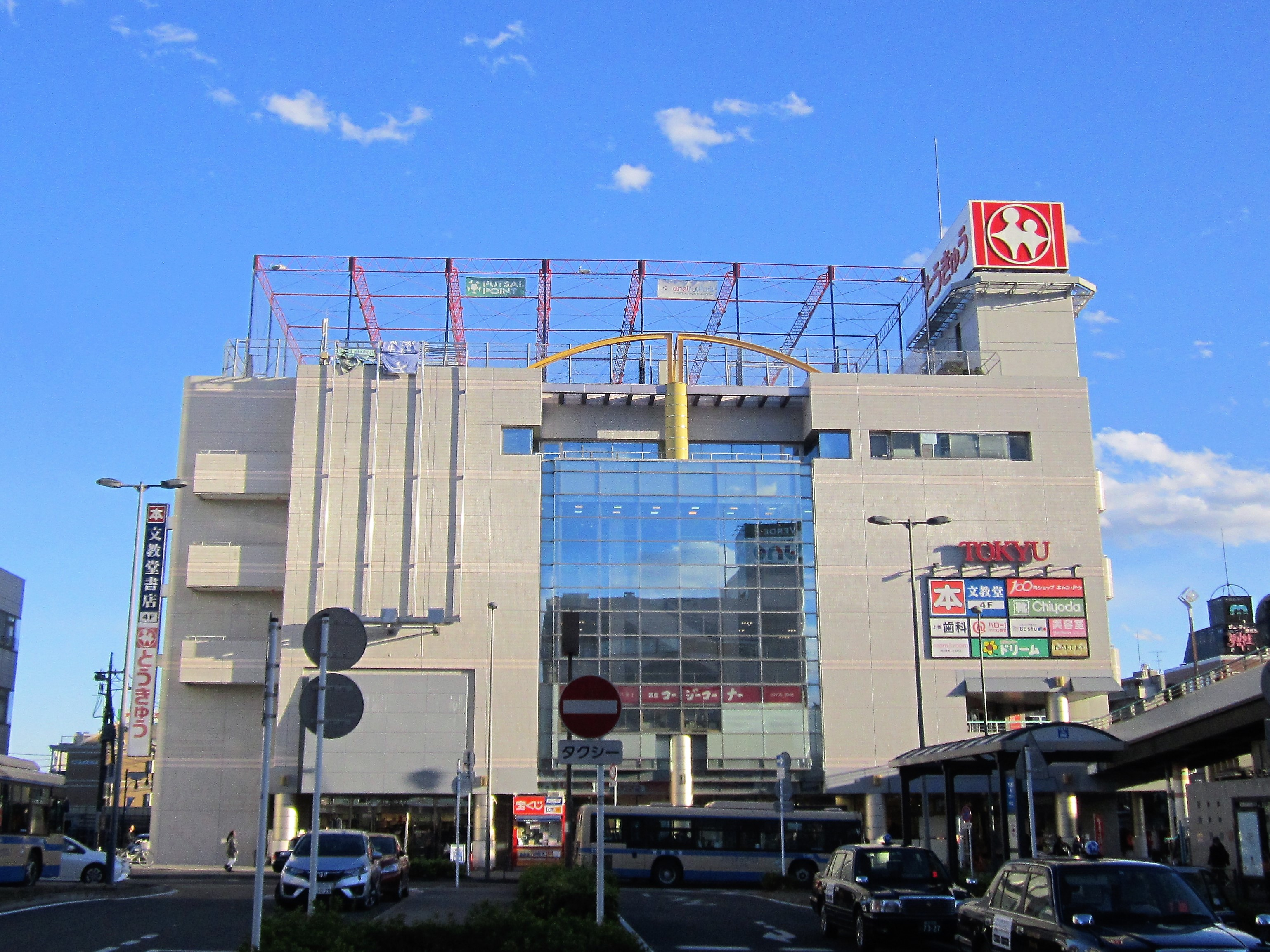 中山とうきゅう（緑区中山） Canon PowerShot A2200